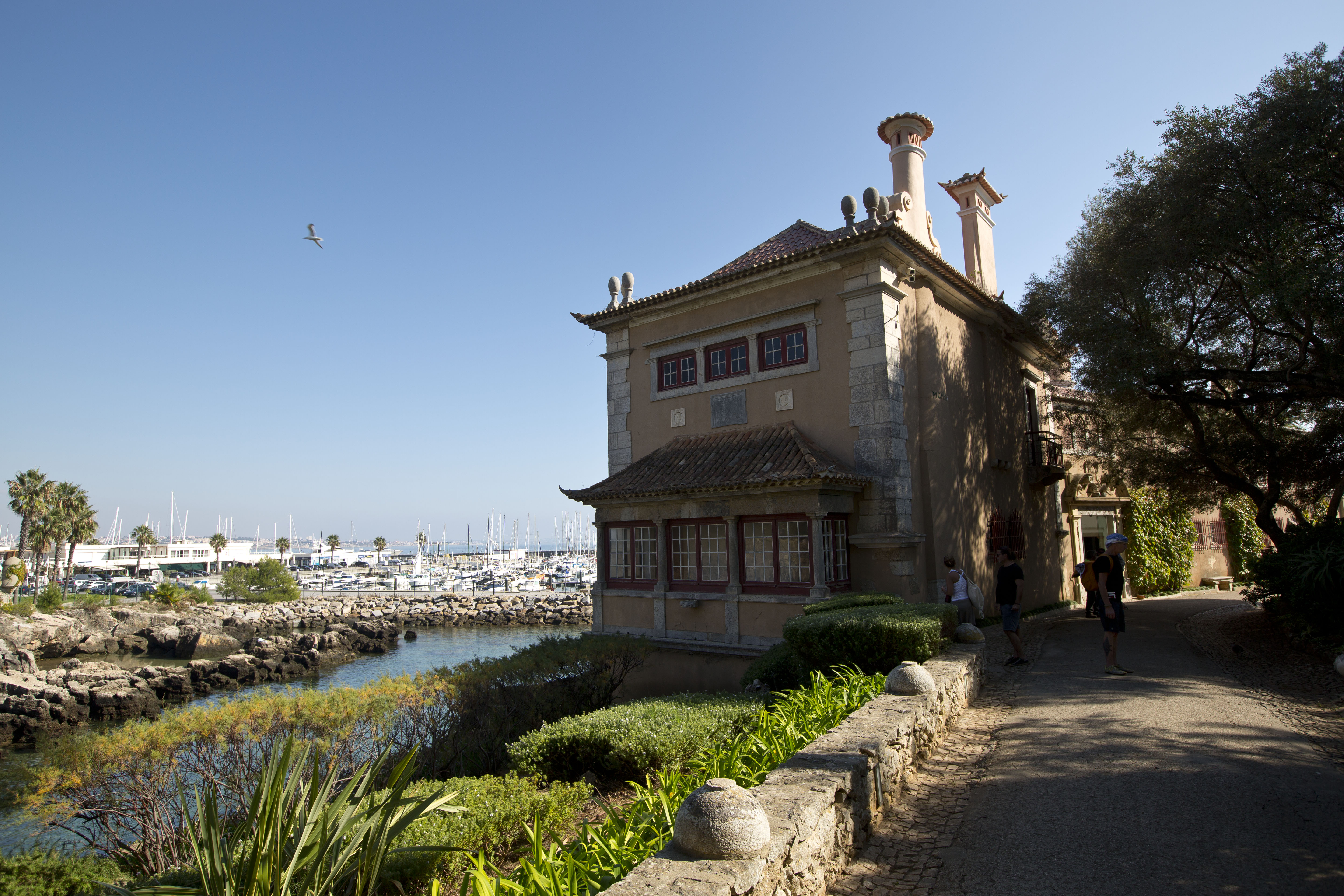 Cascais